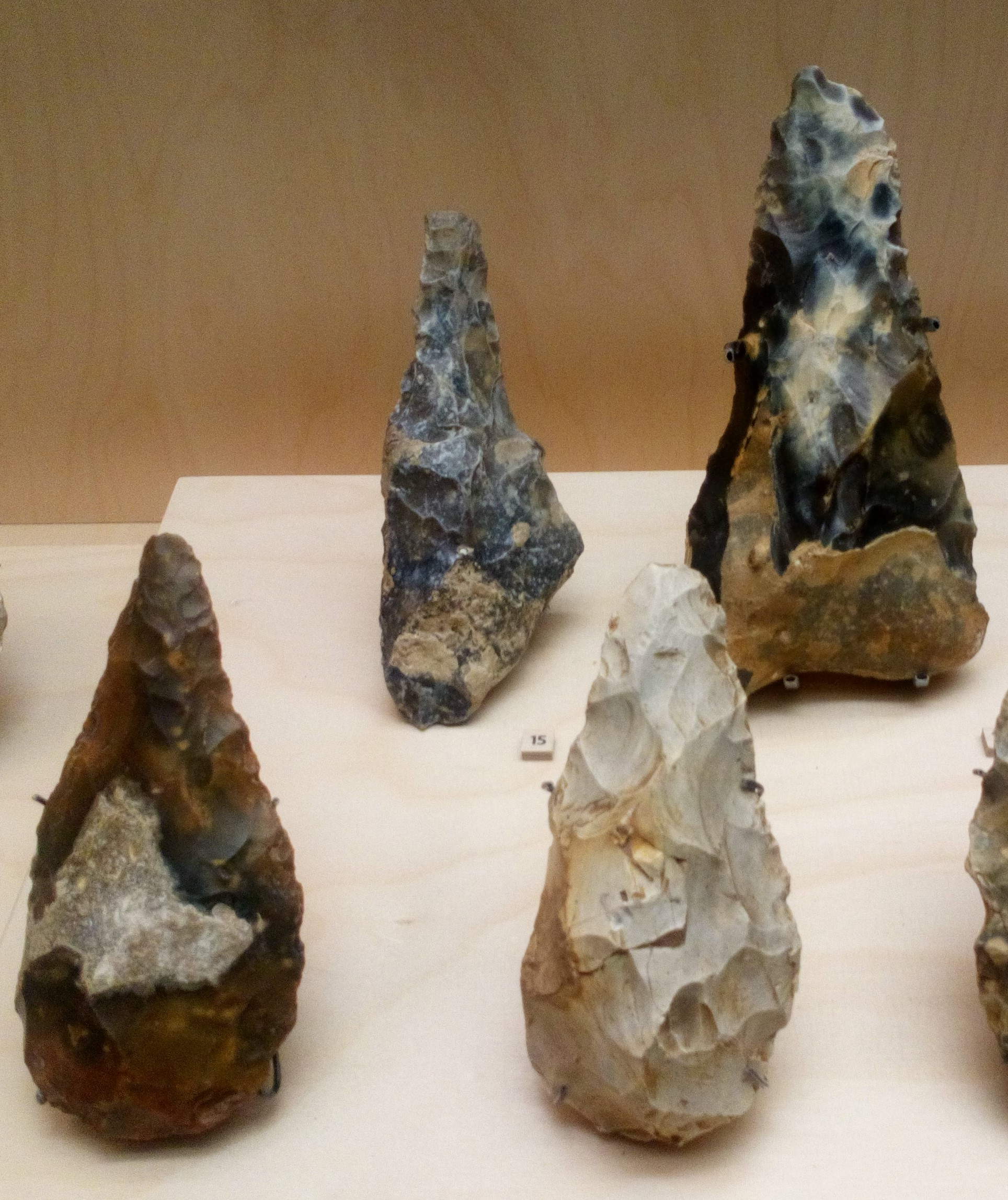 Musée de Picardie, bifaces provenant de Cagny (Somme)